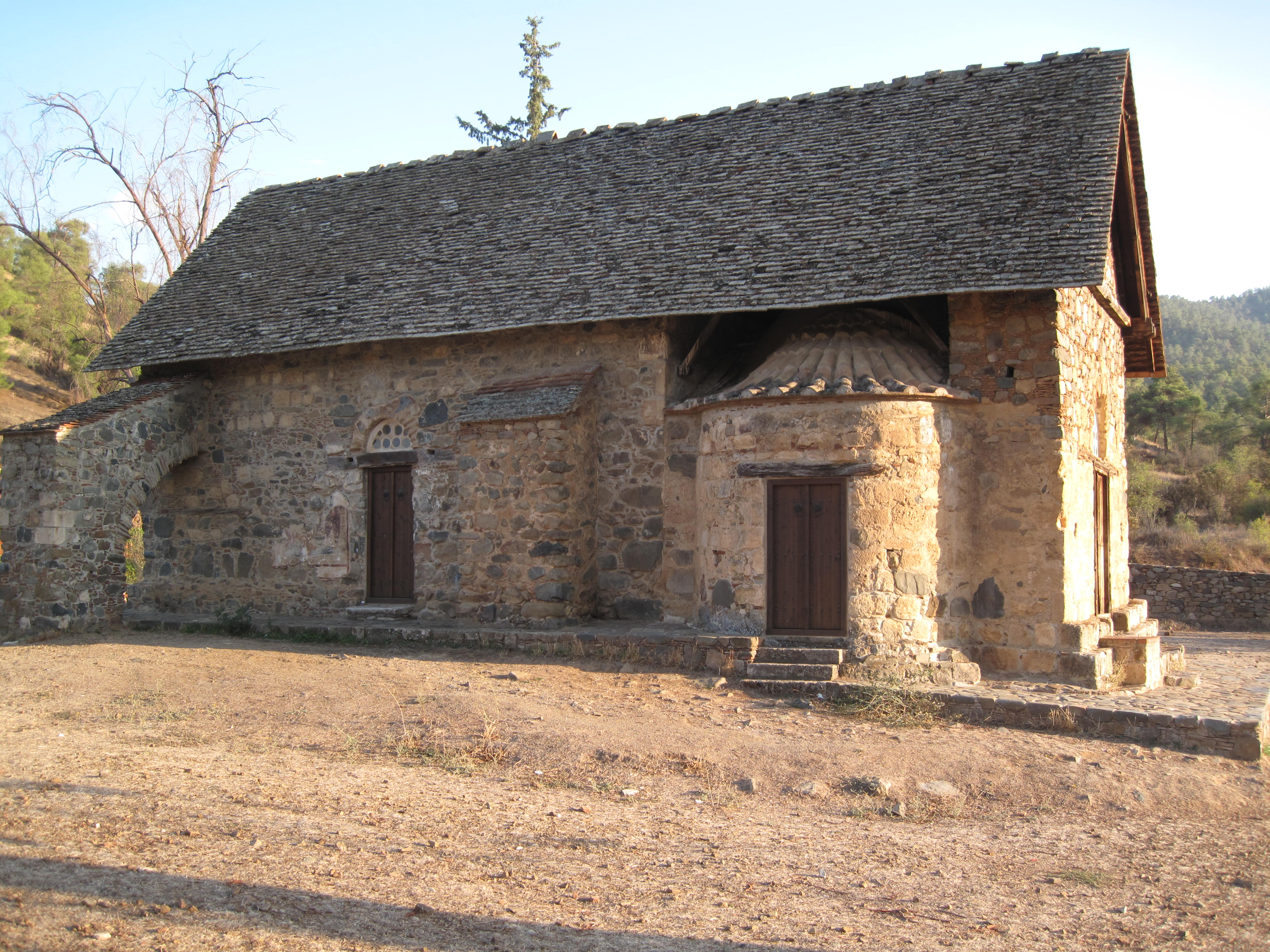 Kerkje van Asinoú